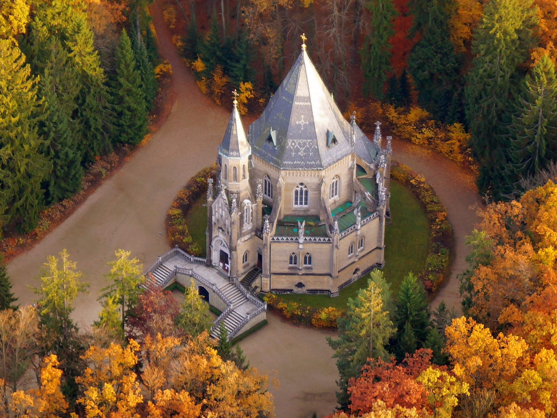 Pohřební kaple Schwarzenberská, s parkem (Domanín), při rybníku Svět, Domanín